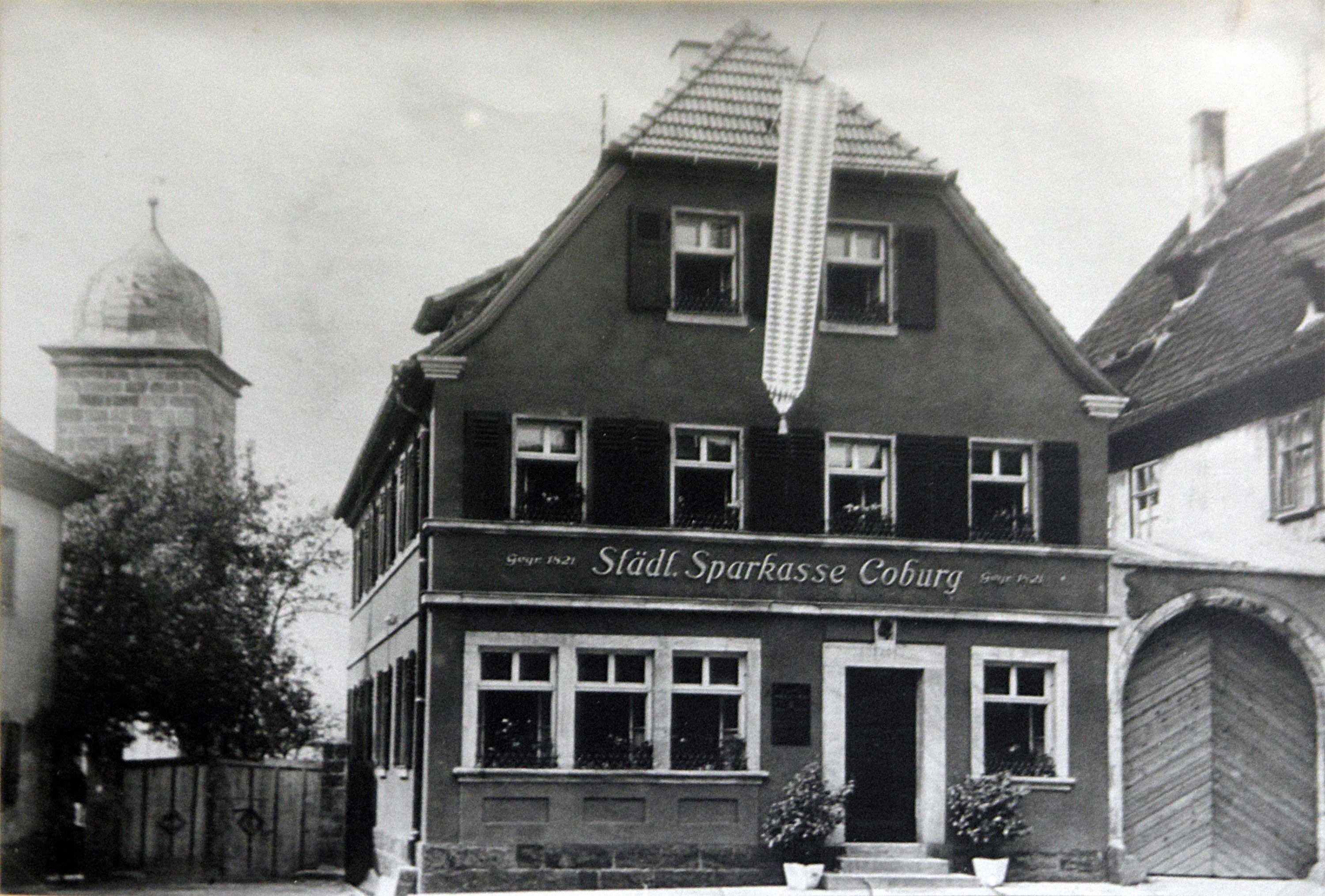 Mit Wirkung vom 01.Oktober 1971 wurden aufgrund der von Bgm. Franz Hübl geführten Verhandlungen die drei Erdgeschossräume in der alten Sparkasse neben dem Grauturm, in der zuletzt die AOK-Geschäftsstelle untergebracht war, durch die Stadt Ebern an- gemietet und dem Bürgerverein für das „Stadtmuseum“ – den Namen Heimatmuseum erhielt es erst später – zur Verfügung gestellt mit der Bitte, veranlassen zu wollen, dass die gemieteten Räume alsbald ihrer Zweckbestimmung zugeführt werden.